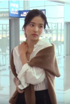 배우 김태리가 18일 오전 인천공항 제2터미널을 통해 중국 상하이로 출국했다.